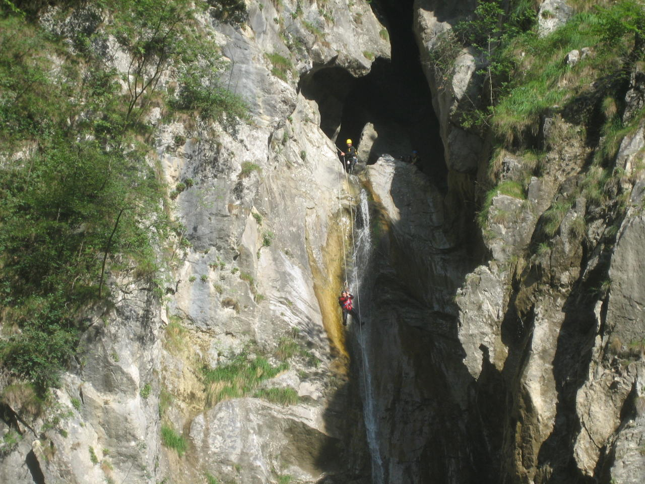 Torrente Palvico. Ultima tappa del percorso di torrentismo: uscita dal "buco della morte" sulla cascata di oltre 50 metri che cade nel pozzo "Malmerio"